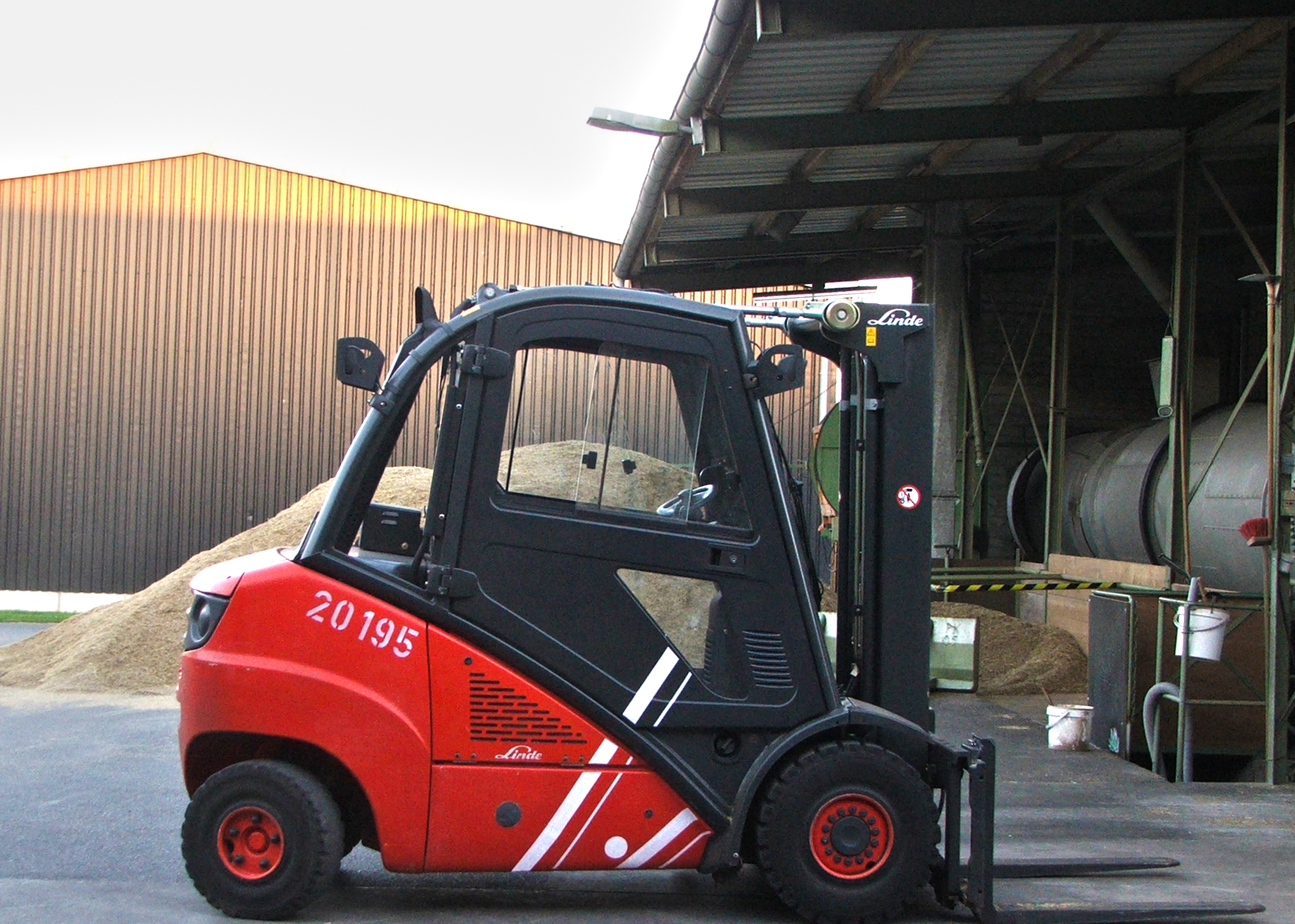 Der dieselhydraulische Gabelstapler Linde H35, hier mit Triplex-Mast